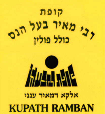 קופת הצדקה של 'קופת רבי מאיר בעל הנס - כולל פולין